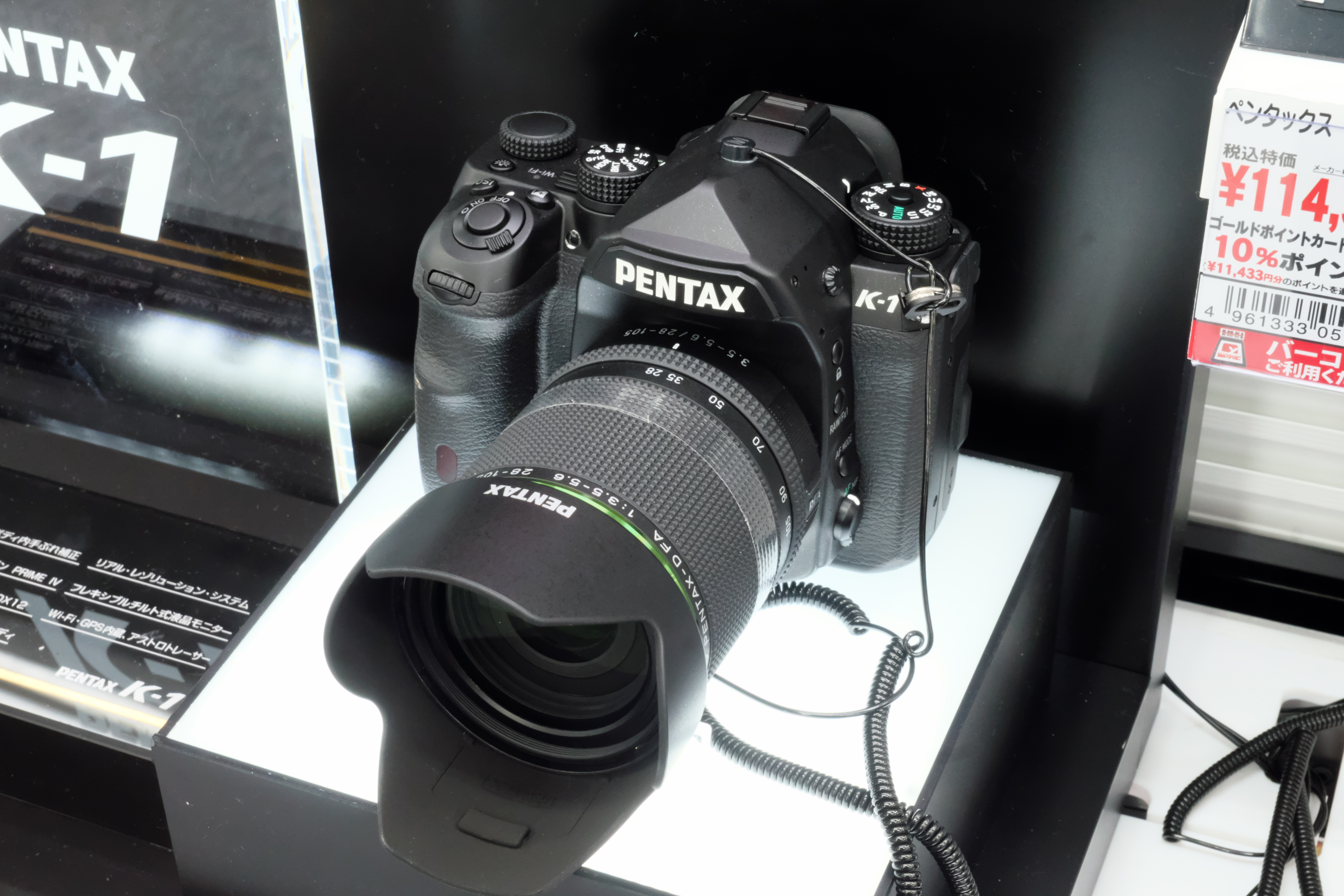 PENTAX K-1 + HD PENTAX-D FA 28-105mmF3.5-5.6ED DC WR （ヨドバシカメラにて撮影）